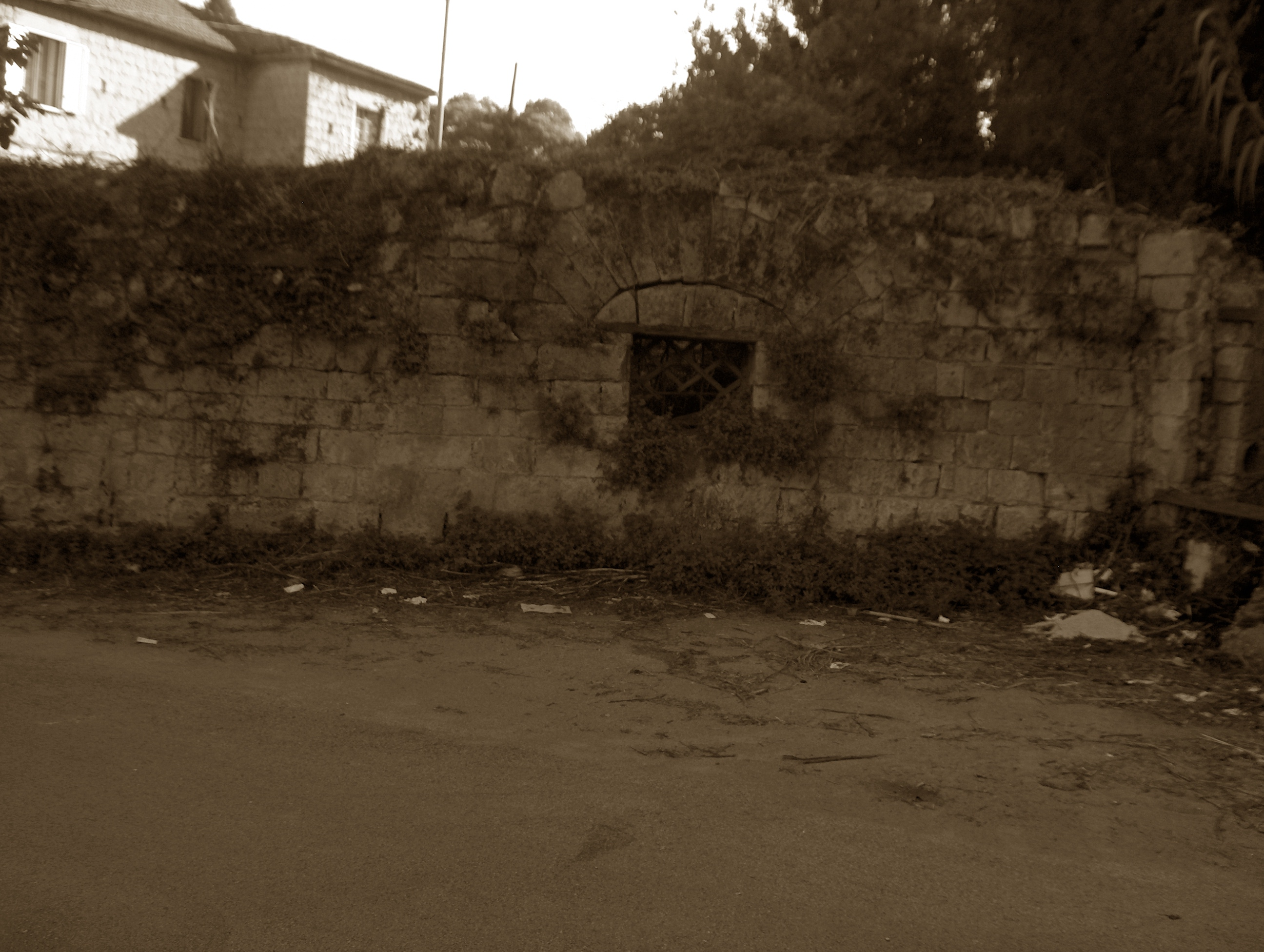 Il Mulino dell'Infornata,antico opificio avellinese attivo dal periodo normanno quasi fino ai giorni nostri.